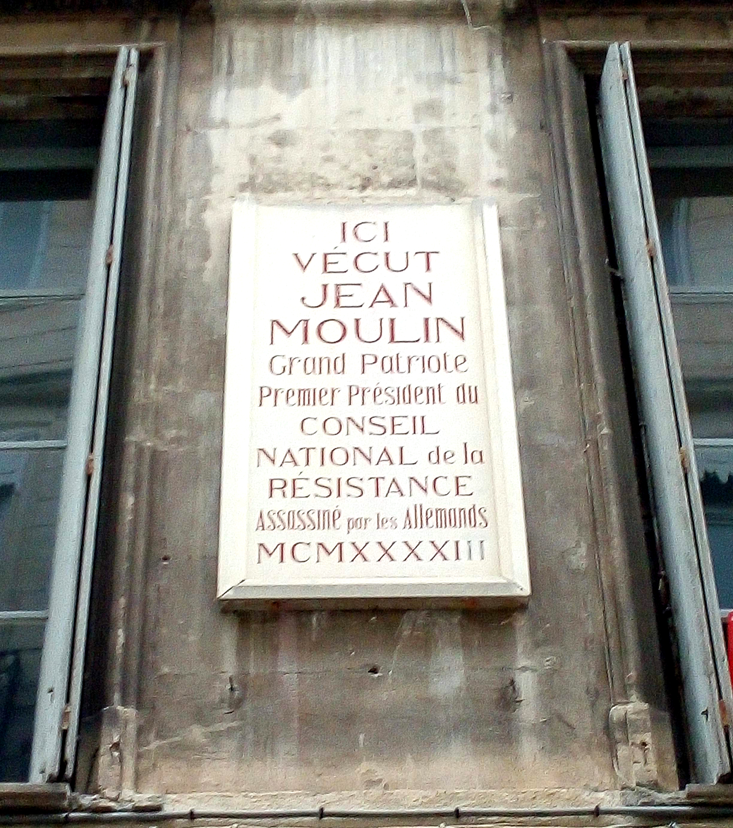 Plaque commémorative installée devant l'appartement où habitèrent Laure Moulin et sa mère à partir de 1937 à Montpellier (Grand-Rue).